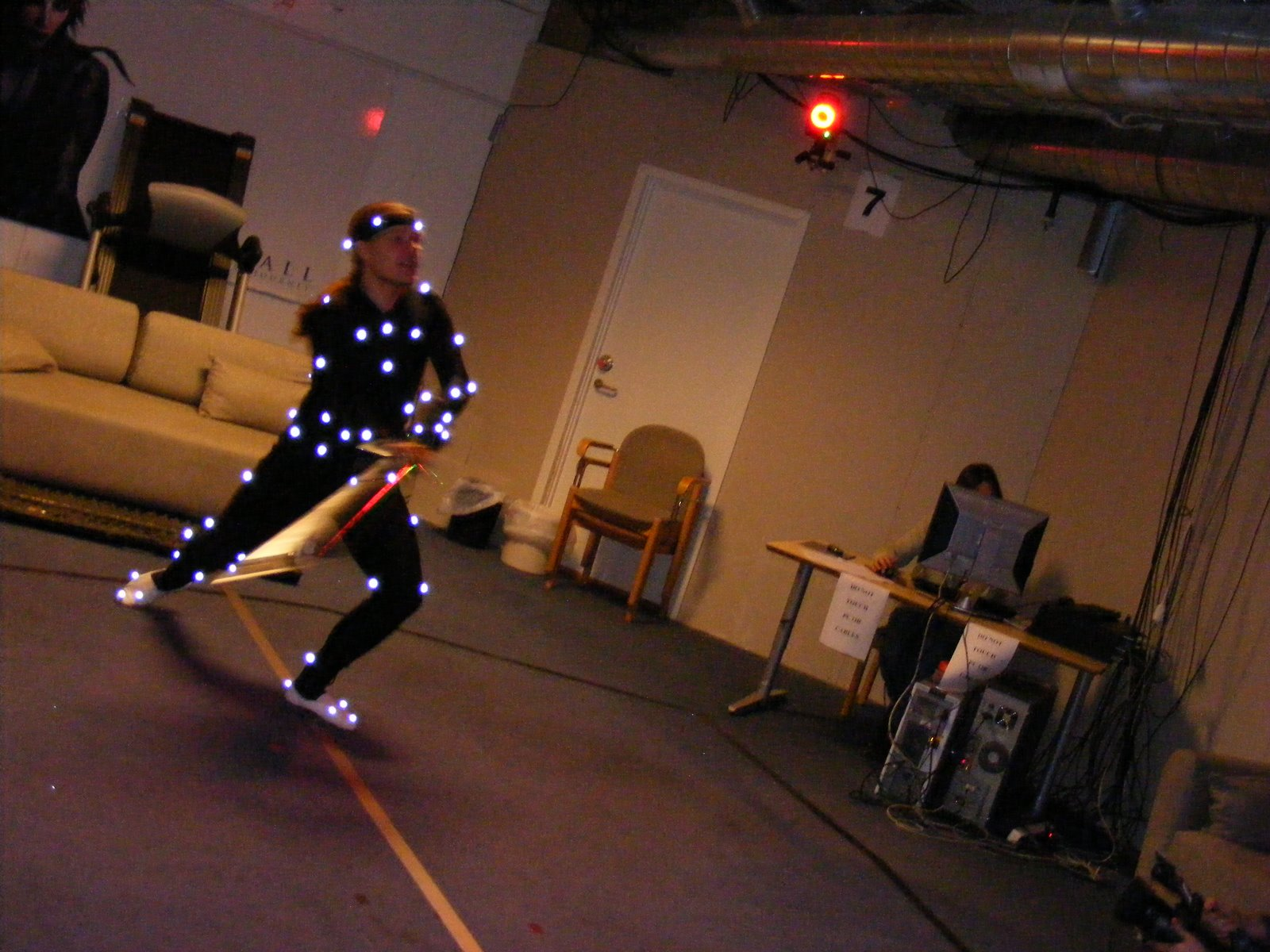 Estudio de captura de movimiento en la empresa Funcom durante el desarrollo del videojuego Age of Conan.